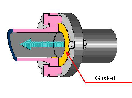 Gasket. Adapted from image:Gasket.JPG